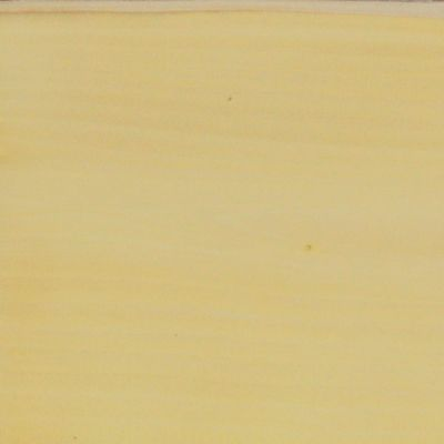 Buxusfa metszete